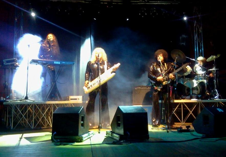 Tour estivo Cugini di Campagna 2012 - Grotte Santo Stefano (Viterbo)